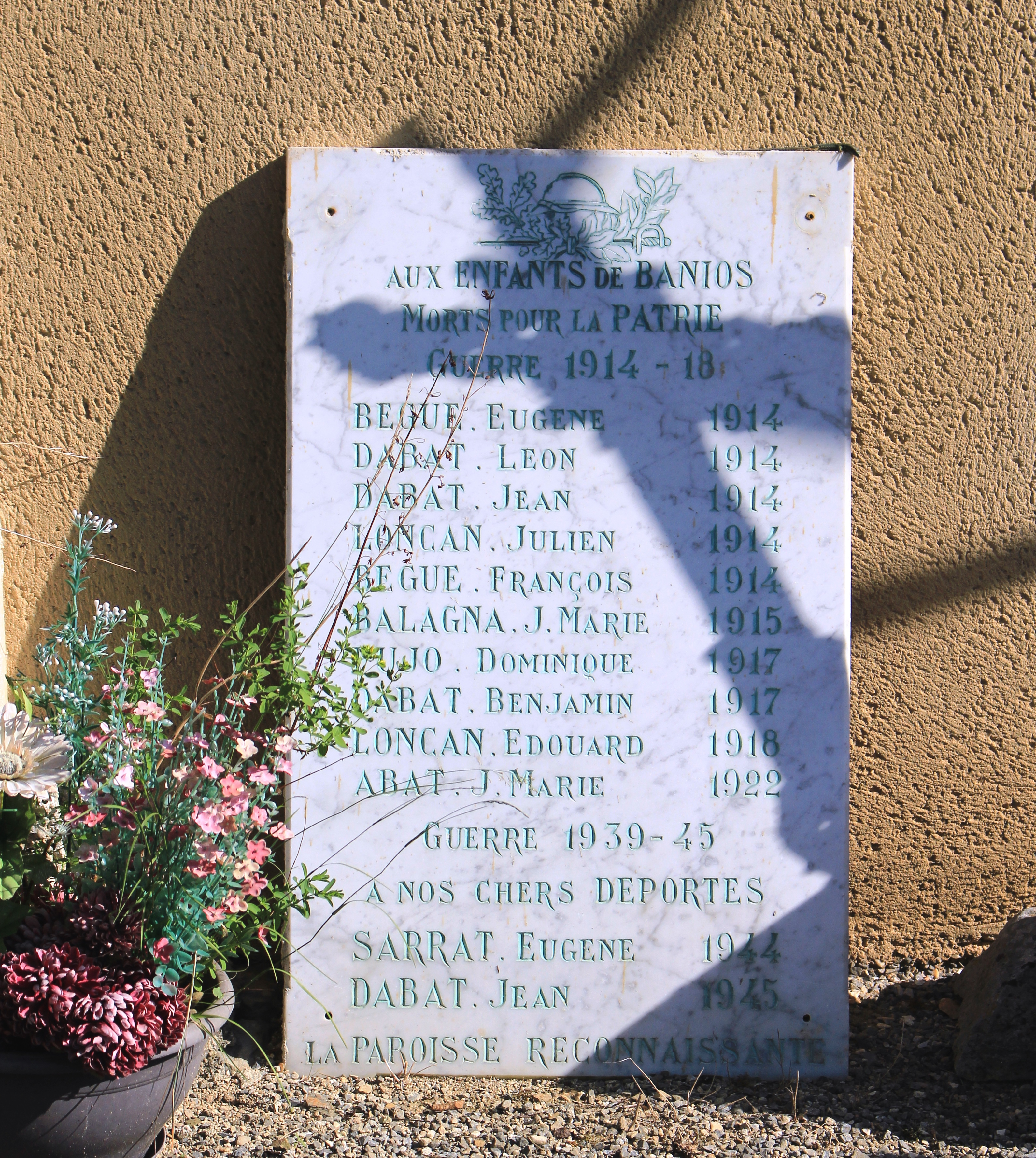 Monument aux morts de Banios (Hautes-Pyrénées)